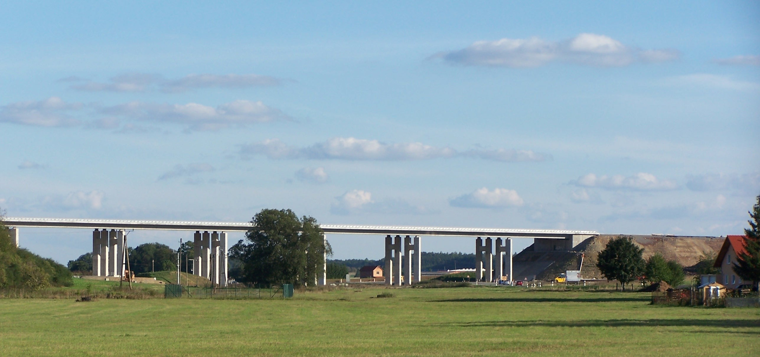 Talbrücke Bibra der A71 zwischen Rentwertshausen und Queienfeld